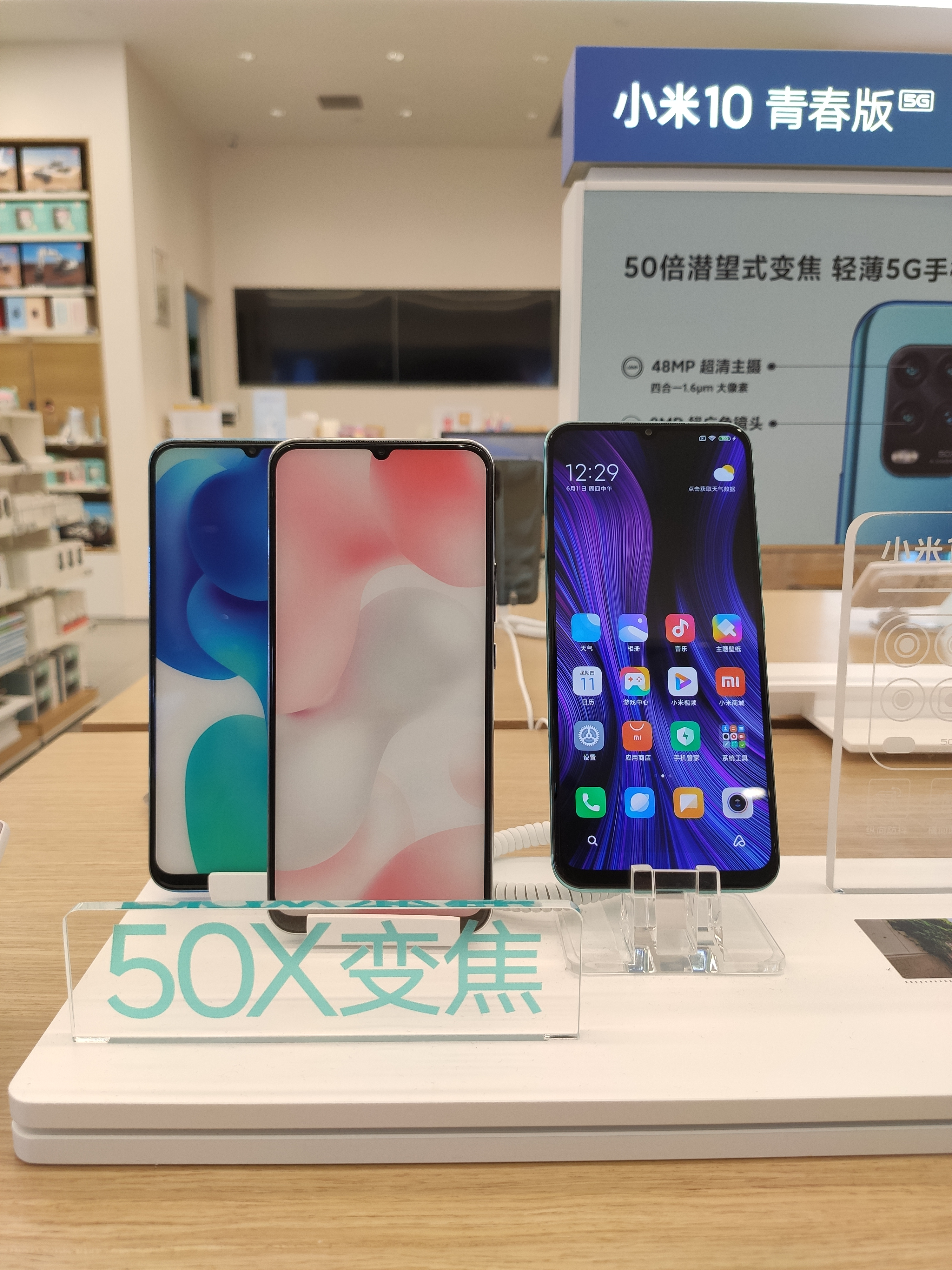 小米10青春版 5G